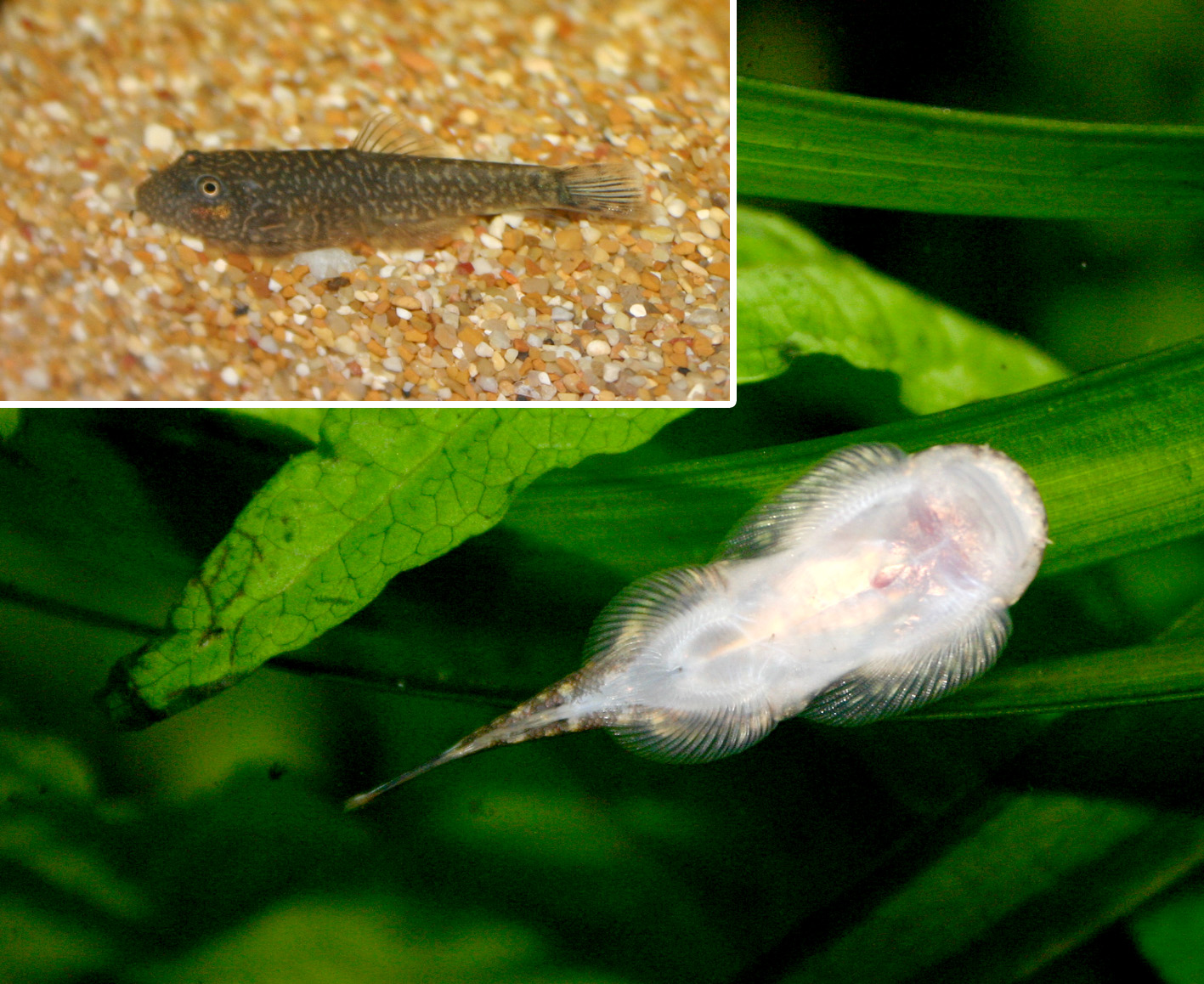 Gastromyzon fasciatus Foto di Marrabbio2